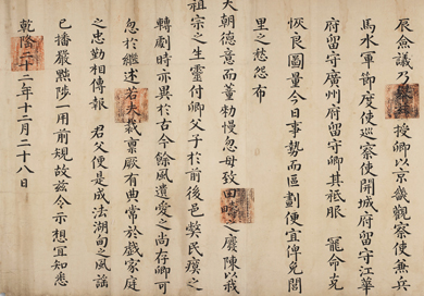 사도세자 영서, 그가 대리청정 기간 중 내린 교서